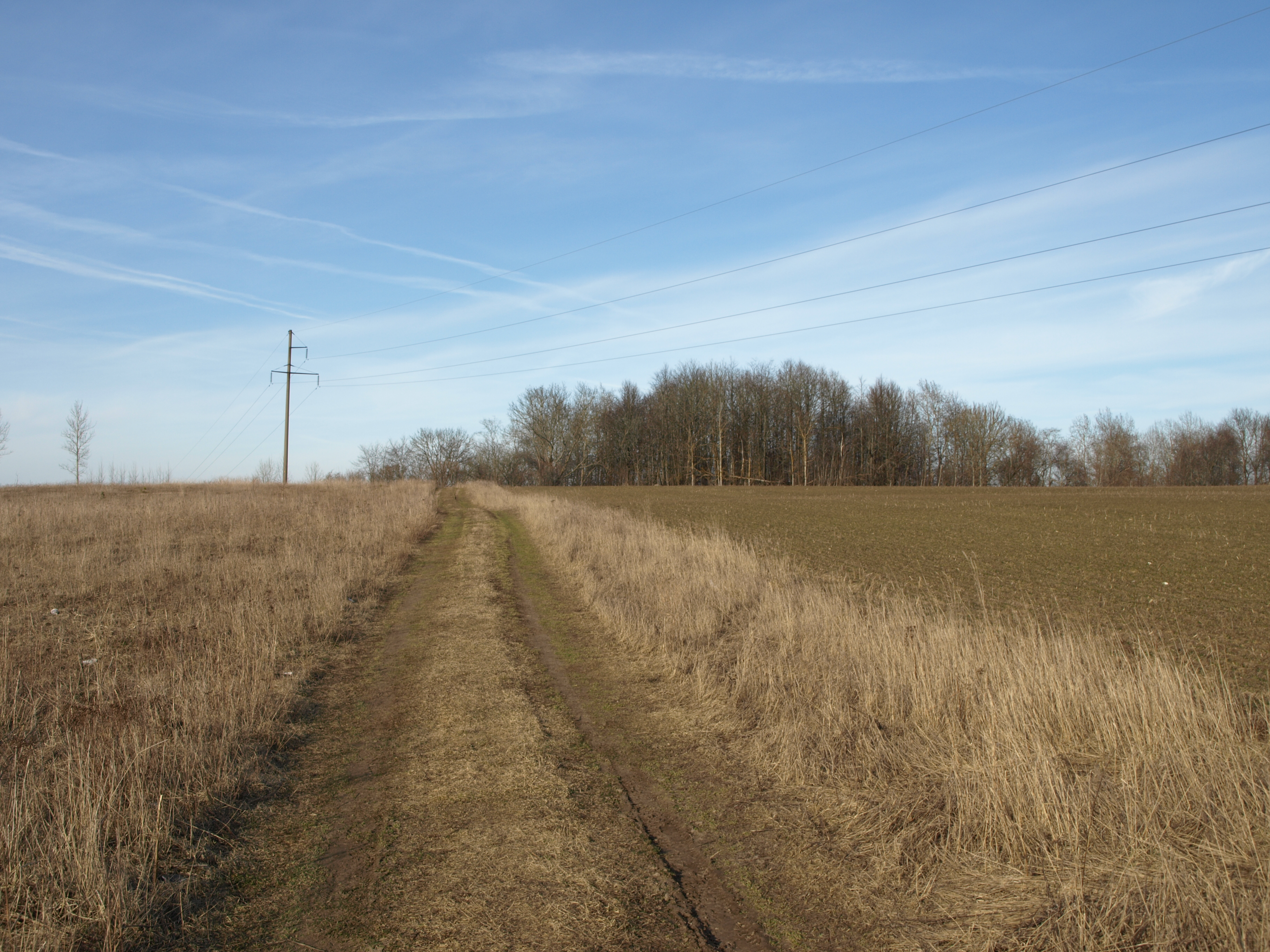 Lähte Palalinna asukoht taamal puudesalus